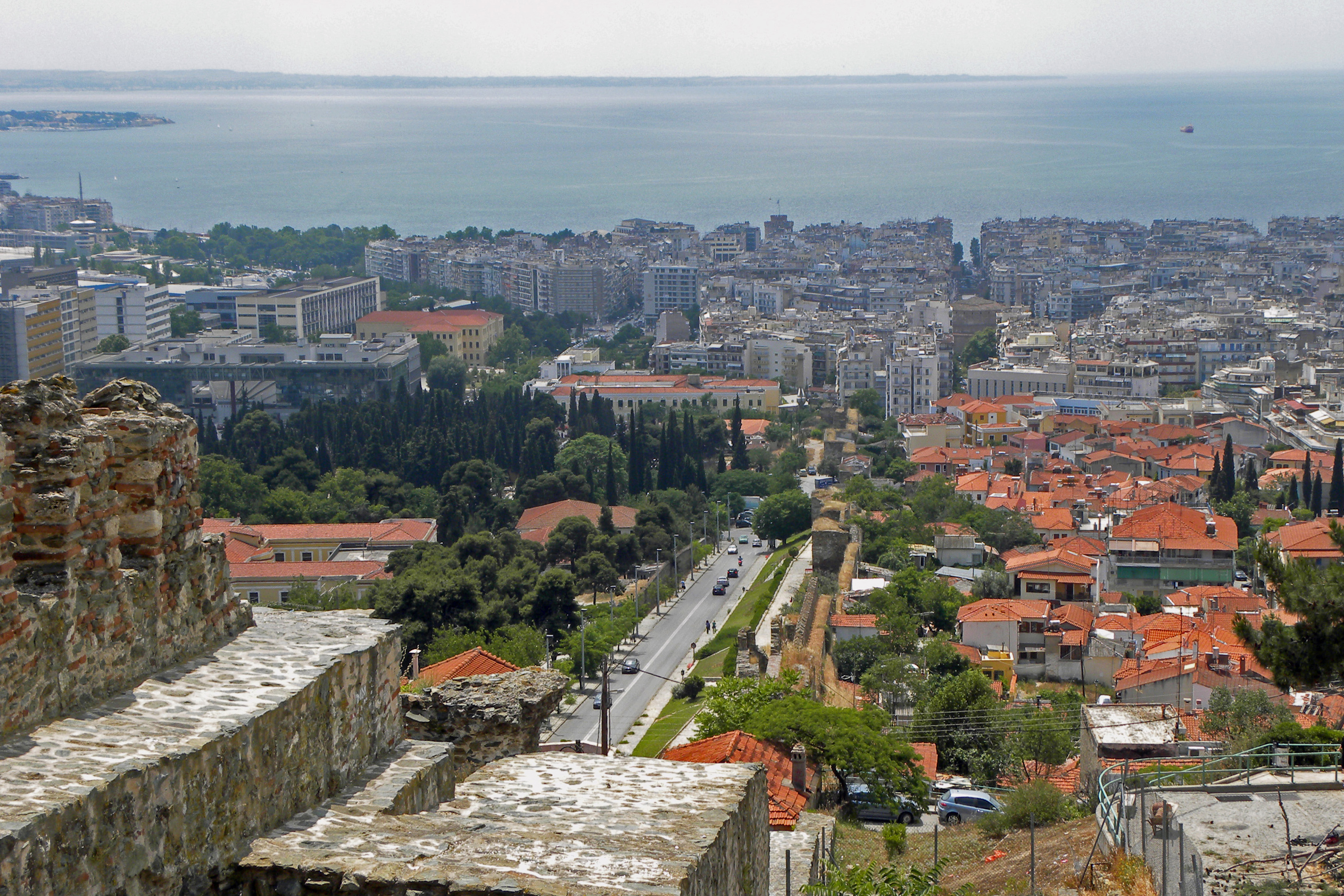 Άνω πόλη